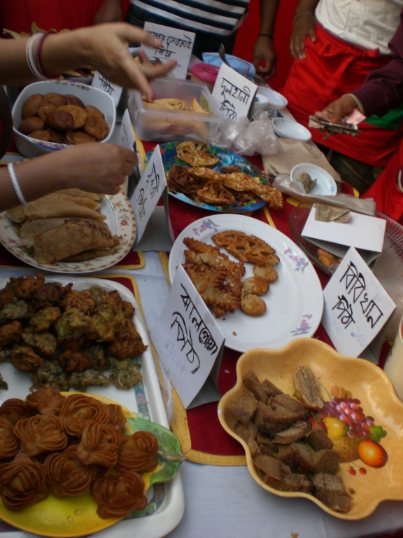 Bangladeshi Snacks. Pitha Utsav, DC Hill, Chittagong, Bangladesh.